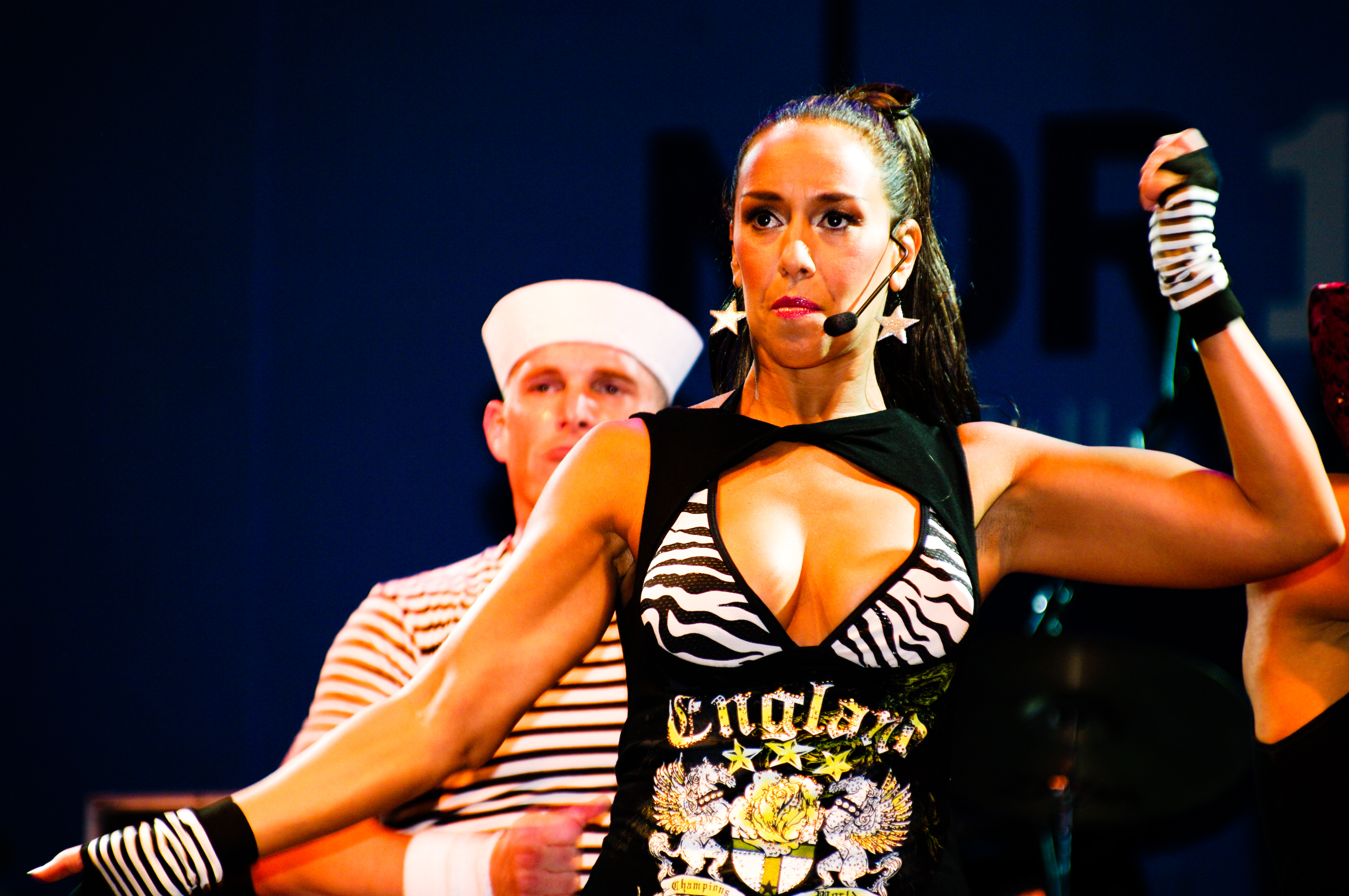 Kim Sasabone der Popgruppe Vengaboys bei der NDR Welle Nord Sommertour Quickborn.